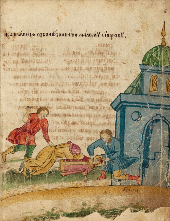 «Сборник житий и богослужебных последований Угличским святым» XVIII века. В состав рукописного Сборника житий и богослужебных последований Угличским святым входит лицевое Житие святого мученика Димитрия Угличского с 12 миниатюрами замечательной красоты. Рукопись была создана в Угличе либо в Угличском районе не ранее 1784-1786 годов.